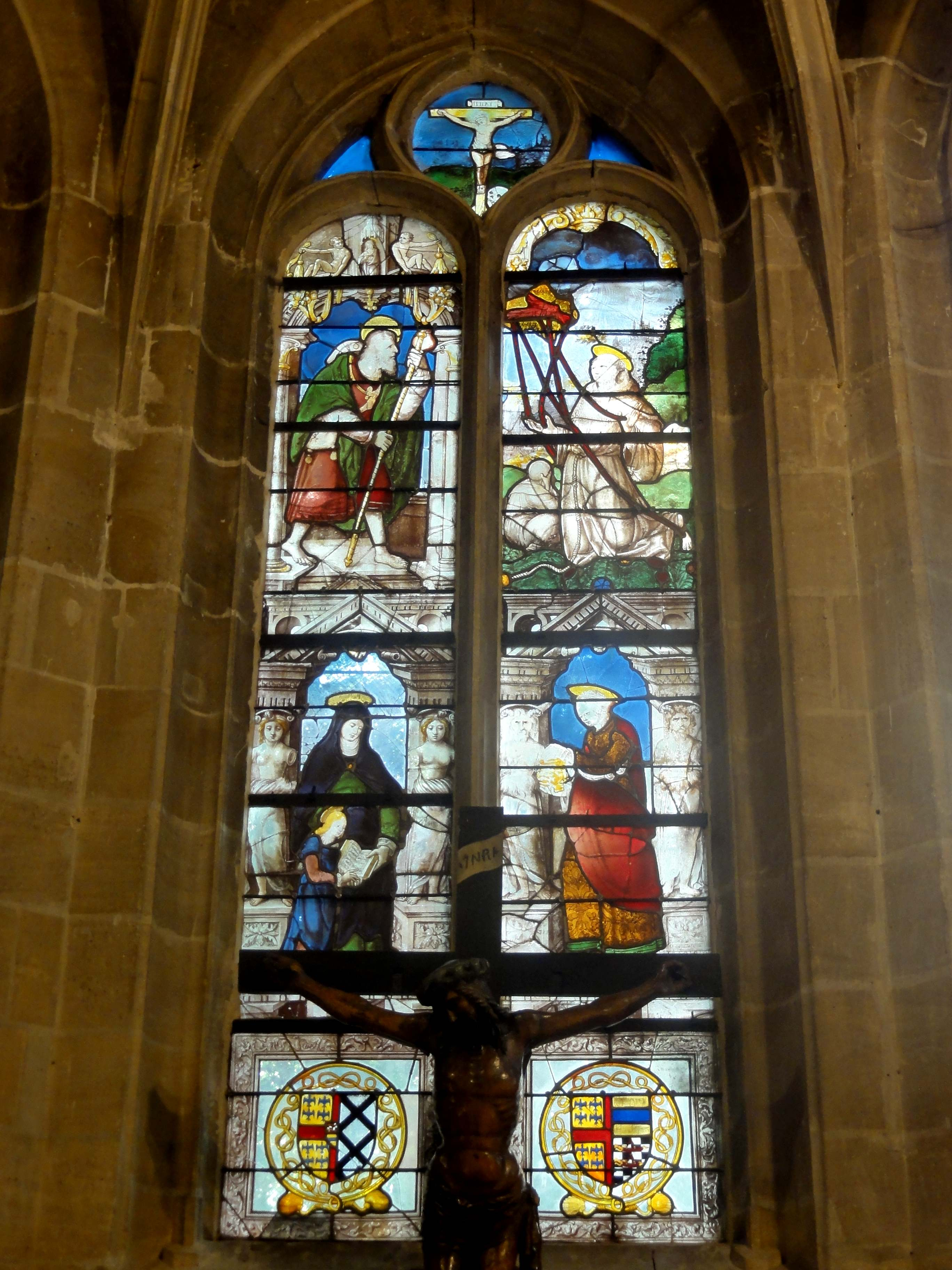 Verrière n° 0.